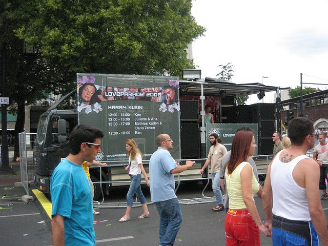 Laster des Clubs Harry Klein aus München auf der Loveparade 2006